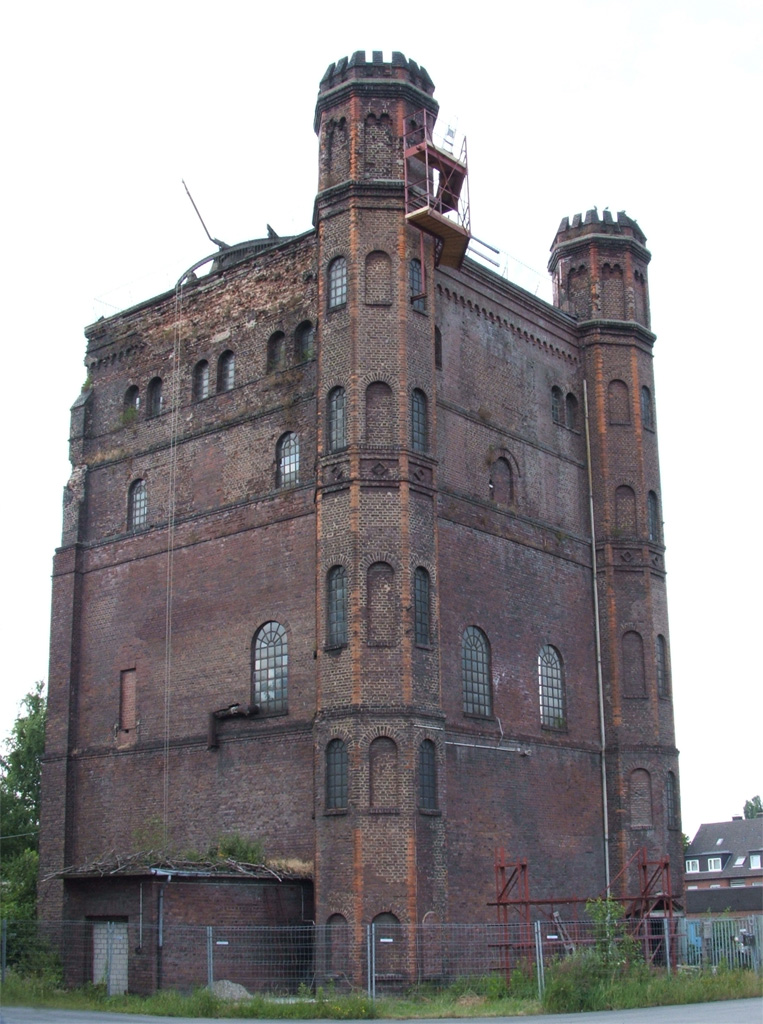 Beschreibung : Zeche Westhausen Malakowturm Fotograf : Gerd W. Schmölter Datum : 03. Juli 2005 Lizenz